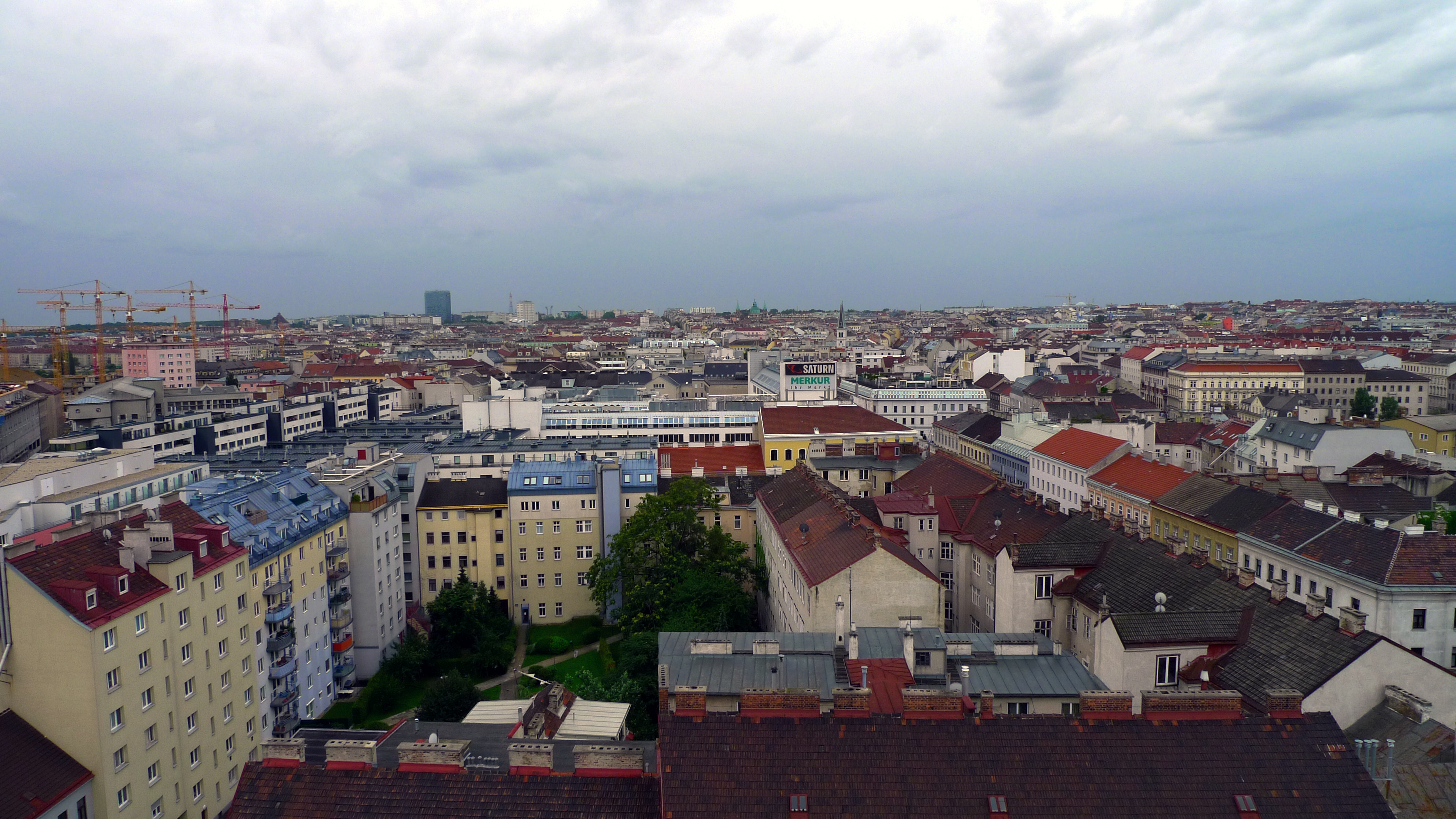 L1080920